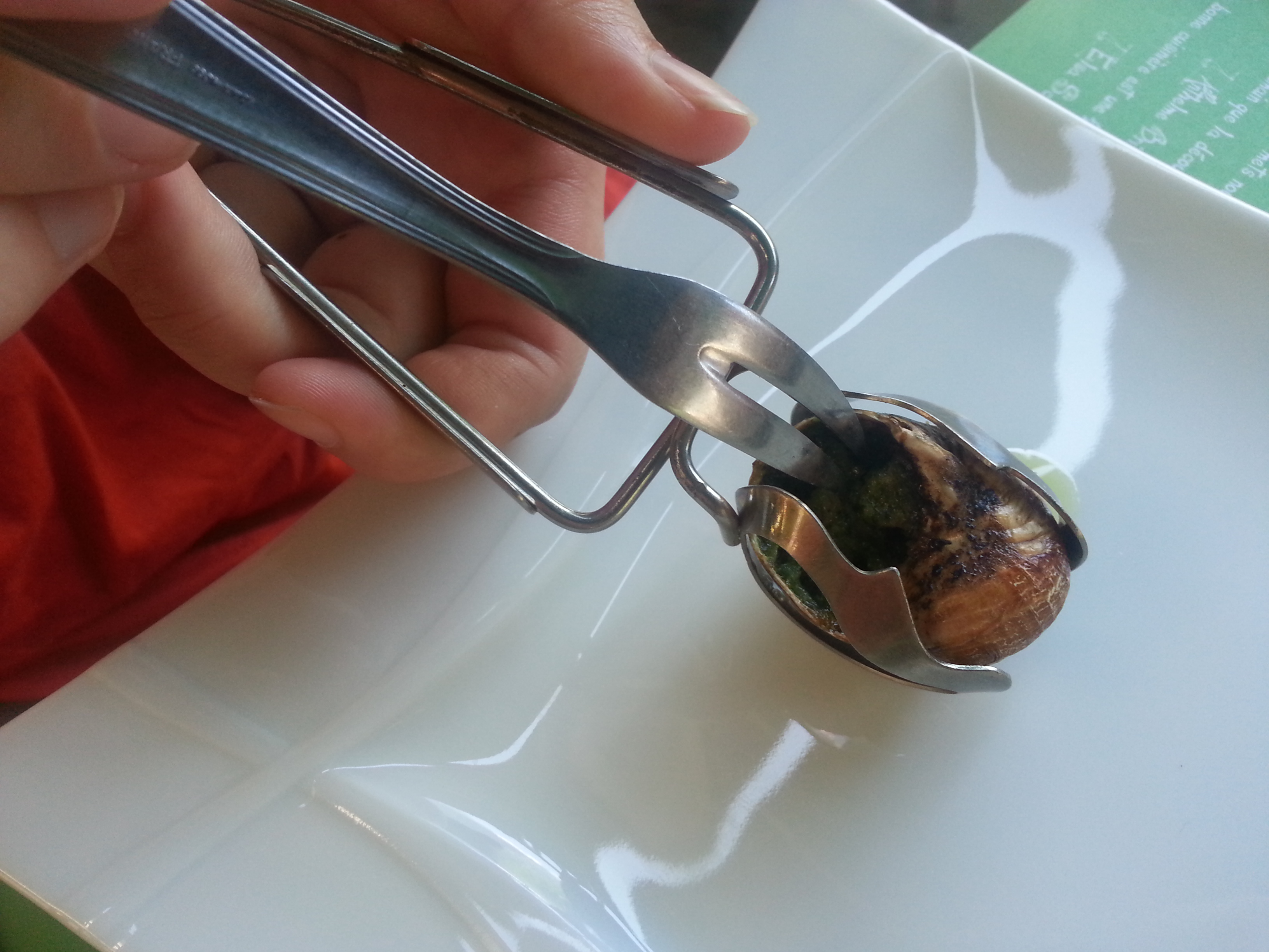 Saisir l'escargot avec la fourchette